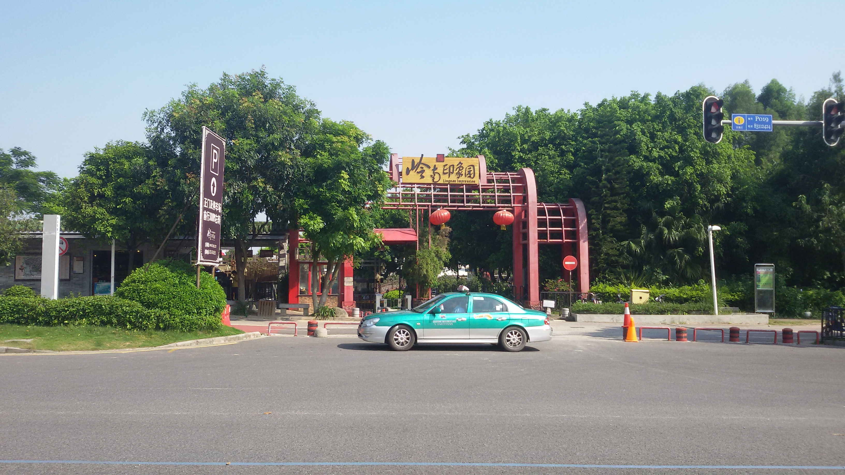 粵語: 岭南印象园